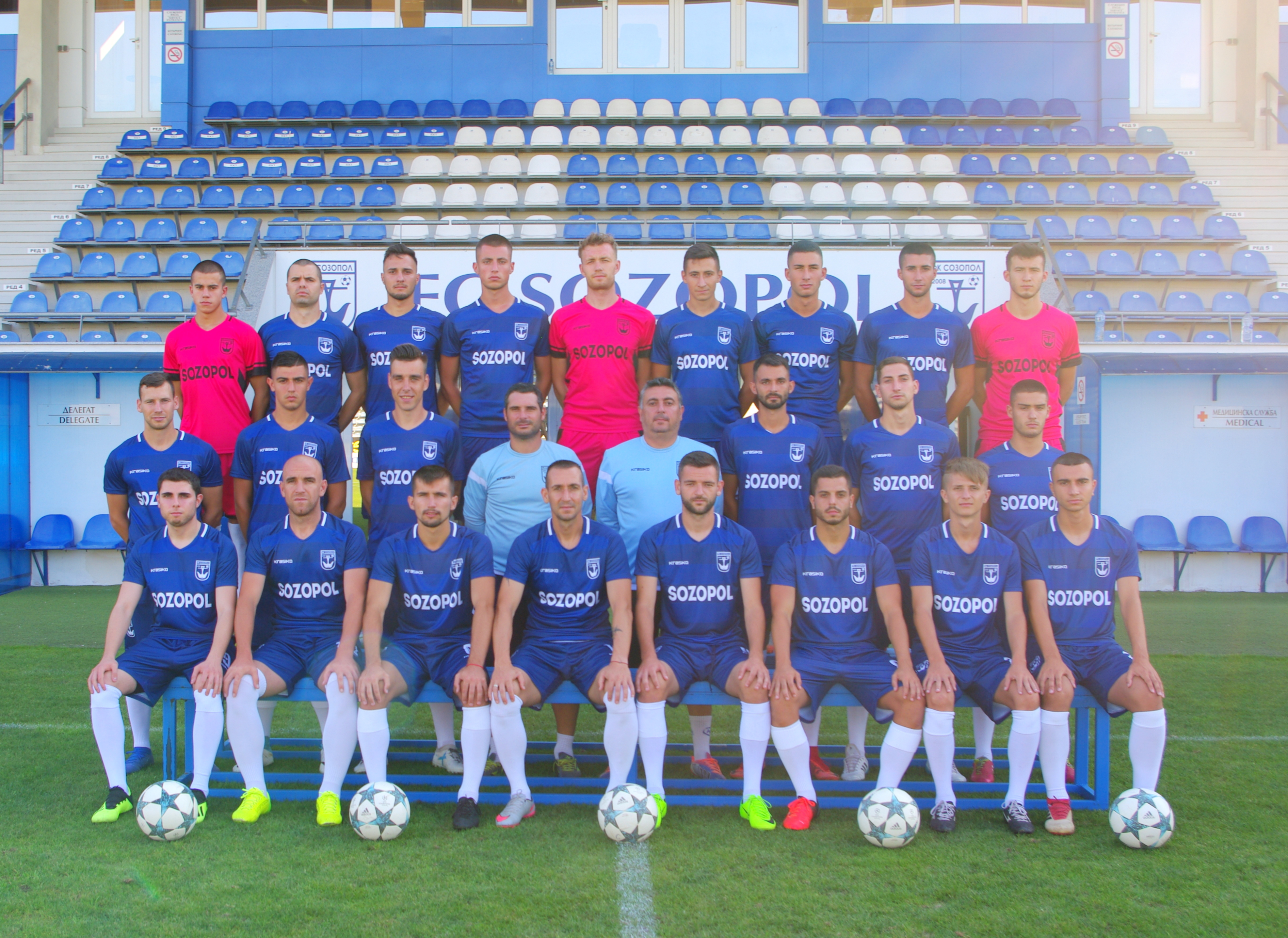 Созопол